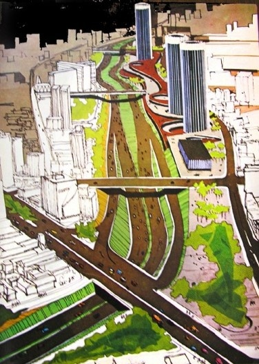 Um dos desenhos realizados pelos arquitetos da Empresa Municipal de Urbanização de São Paulo para a apresentação do projeto Nova Vergueiro (antecessor do projeto do Centro Cultural São Paulo). Esse desenho foi reproduzido pela mídia impressa nacional durante as discussões sobre o projeto.